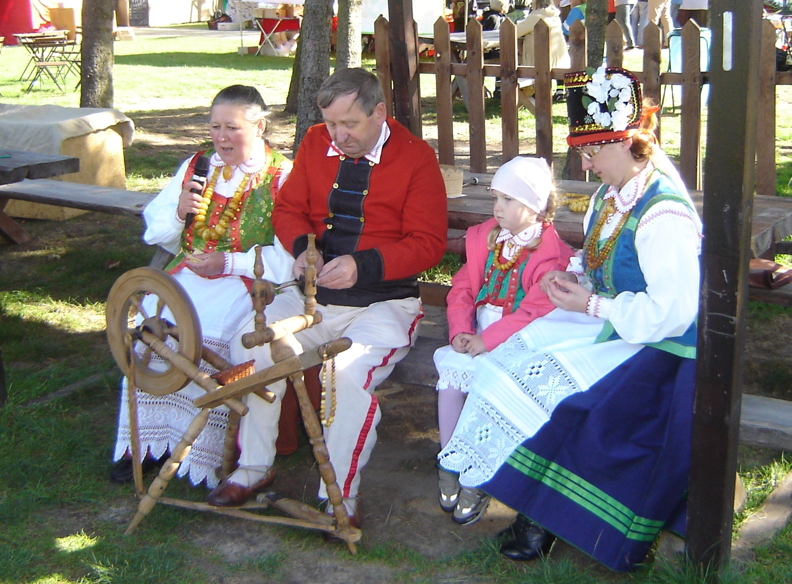 Tradycyjna obróbka bursztynu na Kurpiach przy użyciu kołowrotka. Miejscowość Kadzidło.